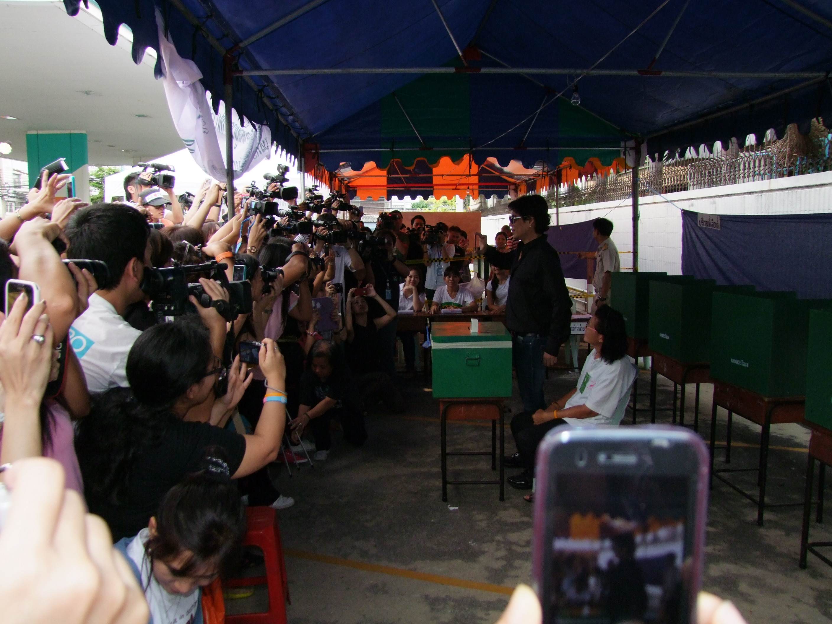 3 มีนาคม 2556 ธงไชย แมคอินไตย์ เลือกตั้งผู้ว่ากรุงเทพ